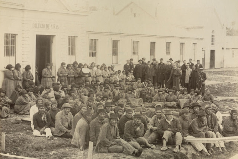 Punta Arenas.- Fueguinos del Colegio Maria Auxiliadora. Publicado en la Revista "Chile Ilustrado" de 1905.